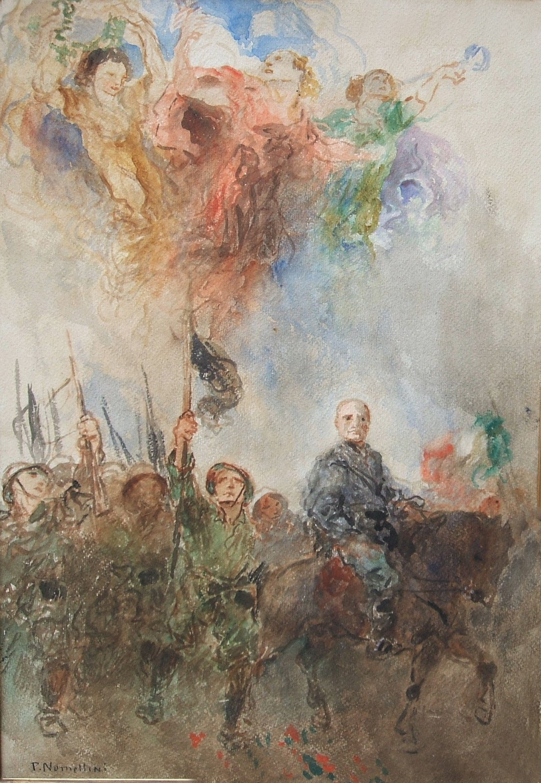 In Trionfotitle QS:P1476,it:"In Trionfo" label QS:Lit,"In Trionfo"